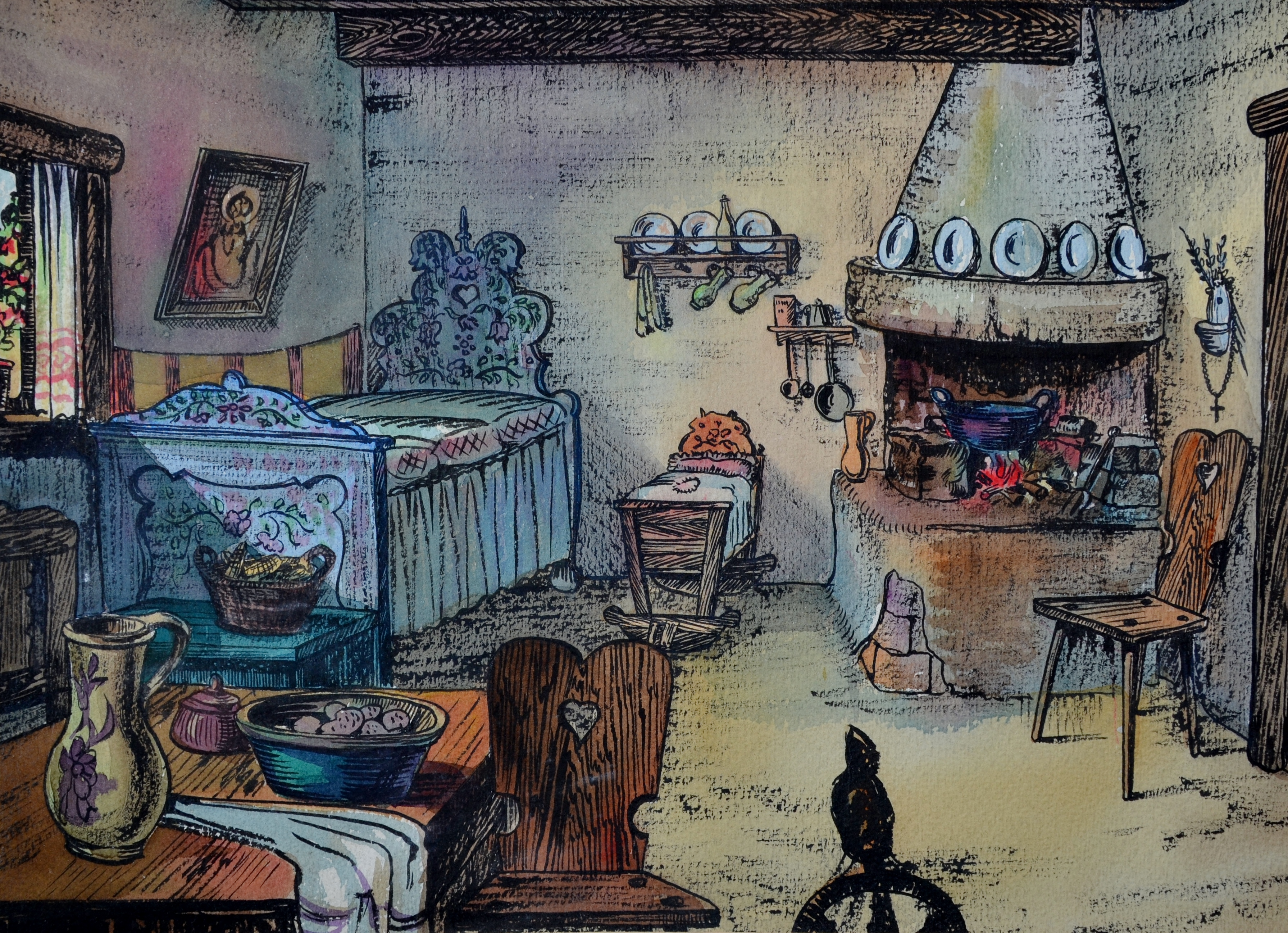 Emberek a havason (Szőts István, 1942) - Sőrés Imre díszletterve.